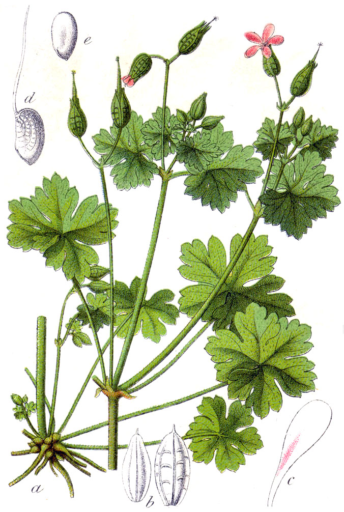 Geranium lucidum L. Original Caption Glänzendes Geranium, Geranium lucidum